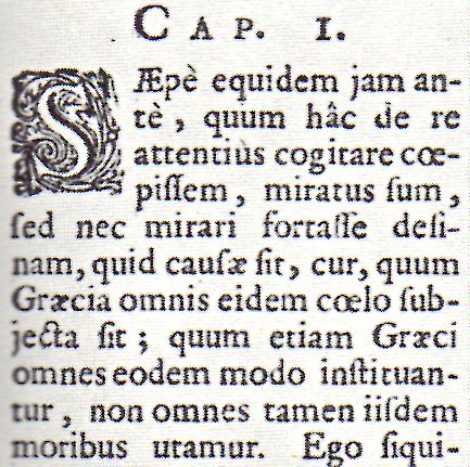 Page de Theophrasti Characteres ethici, 1688, Amstelodami, avec accents adverbiaux.